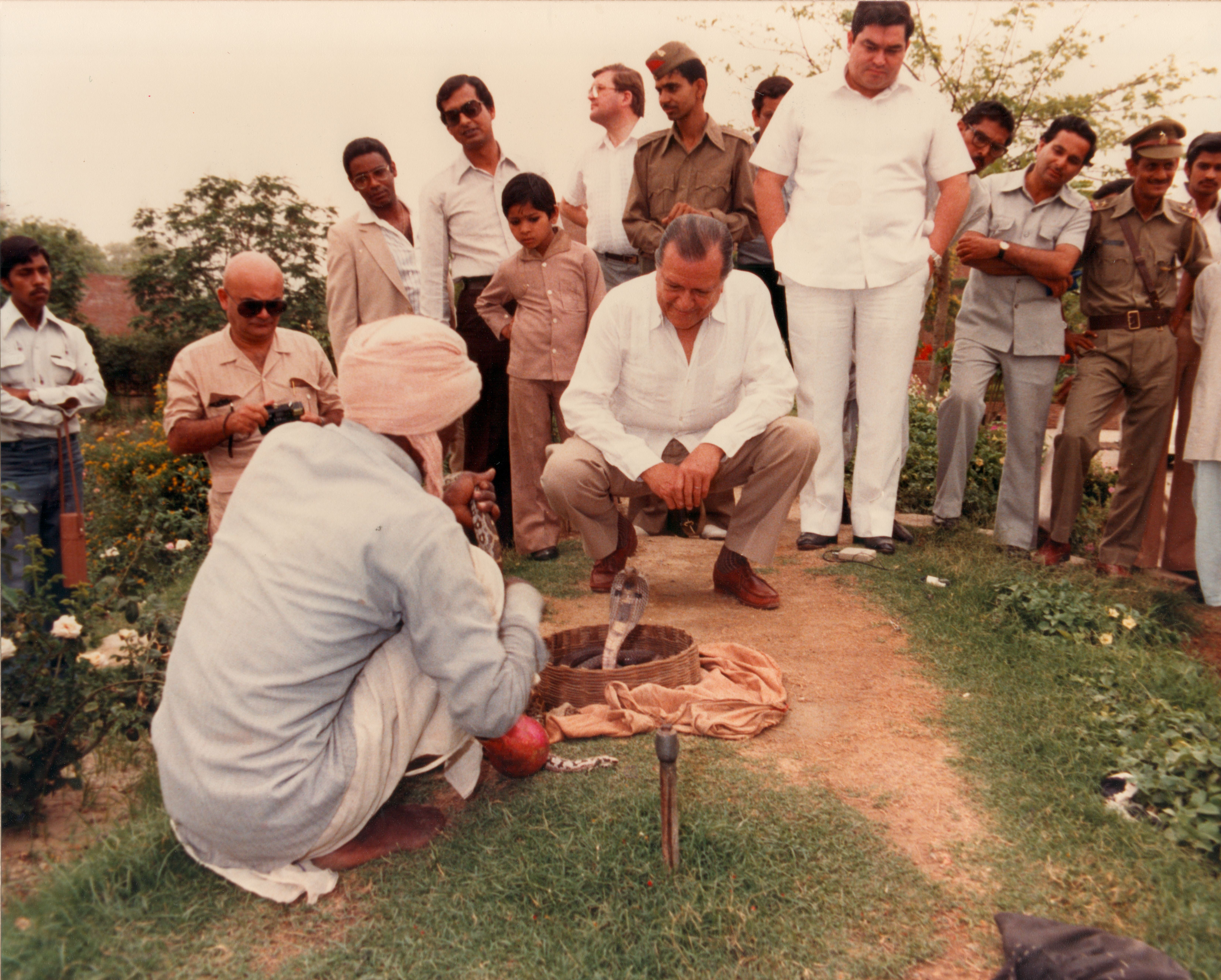 Rafael Caldera, de visita en la India, como presidente de la Unión Interparlamentaria Mundial.